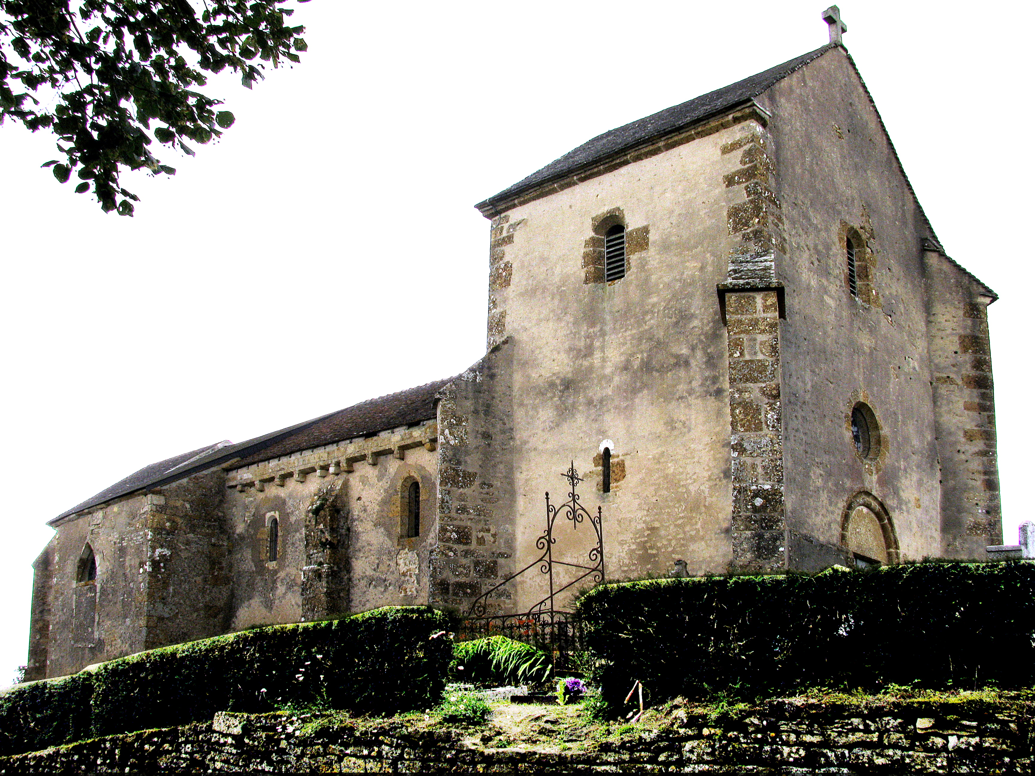 Chapelle Saint-Pierre-aux-Liens de Mont-Sabot, à Neuffontaines, Nièvre, France.